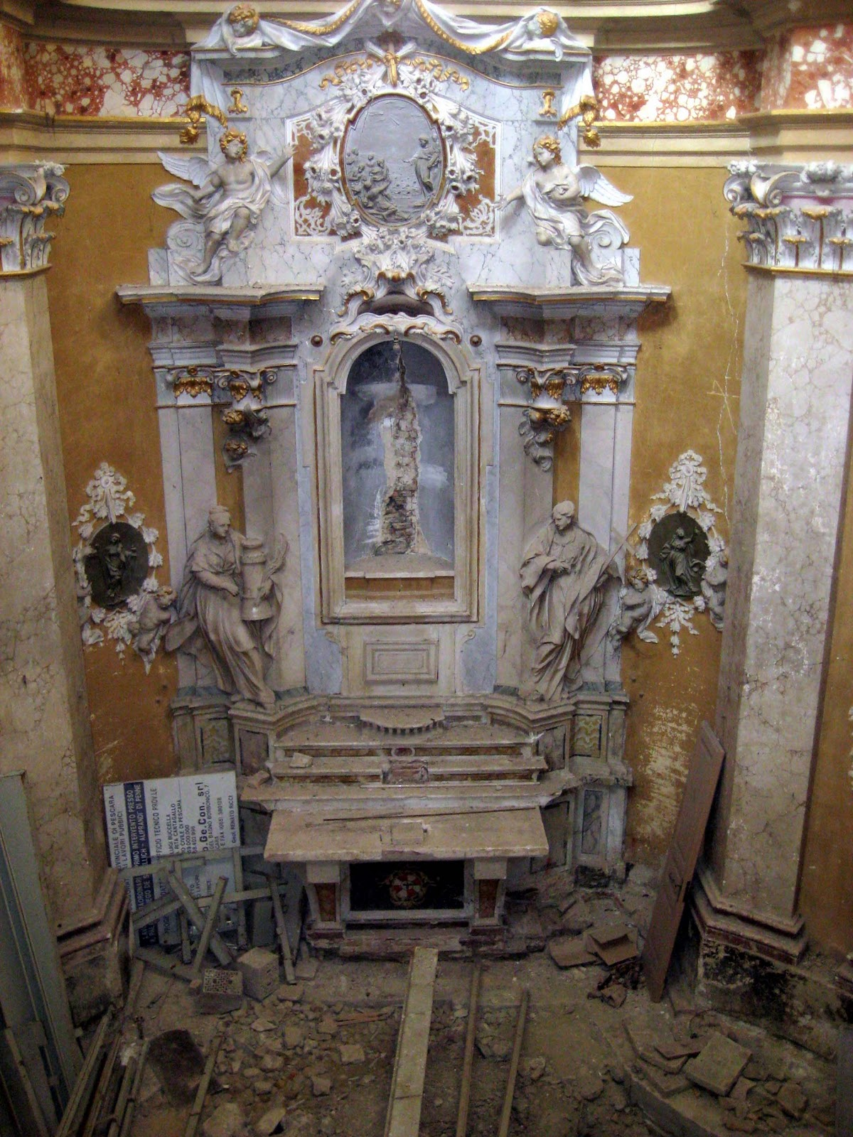 Chiesa di Sant'Antonio di Padova a Penne (Pescara)